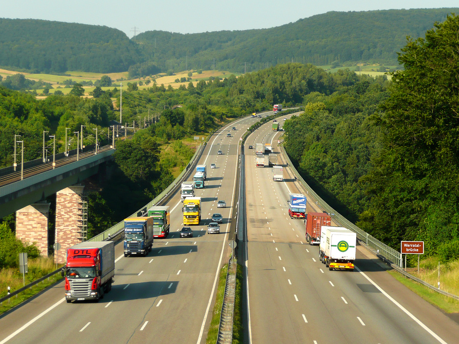 Werratalbrücke Hann. Münden